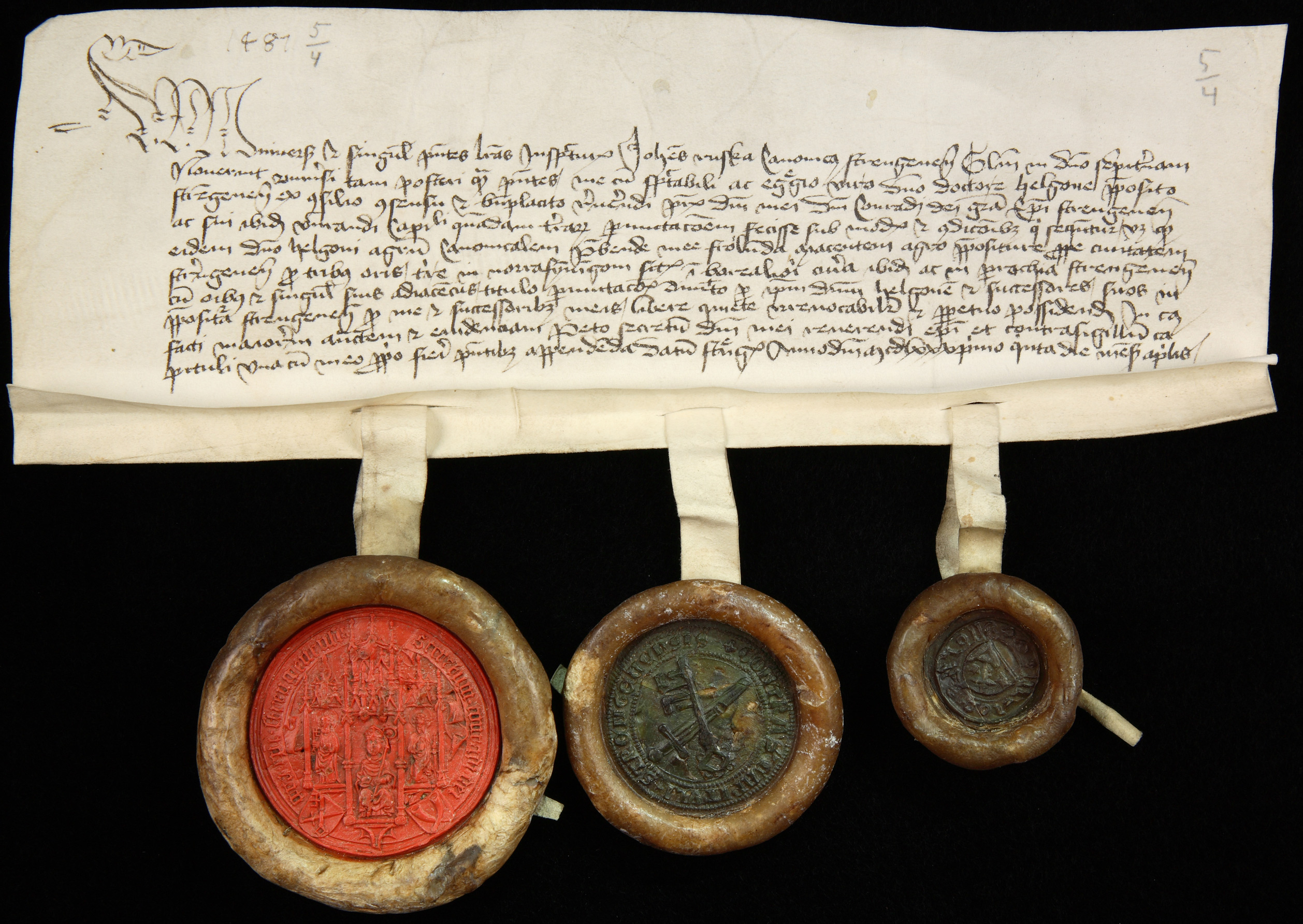 Johan (Gervinsson) Ruska, kanik i Strängnäs, gör med samtycke av biskop Konrad (Kort Rogge) och domkapitlet ett byte av prebendejord med domprosten, doktor Helgo (Petri), som får Frölunda mot tre öresland jord i Norr-Finninge. Brevet är beseglat med biskop Korts sigill, domkapitlets kontrasigill och utfärdarens eget.